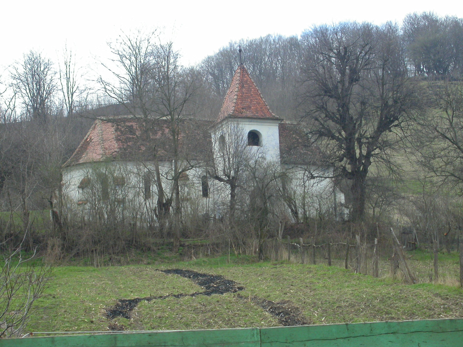 Biserica evanghelică, sec. XV,1786 (turn)